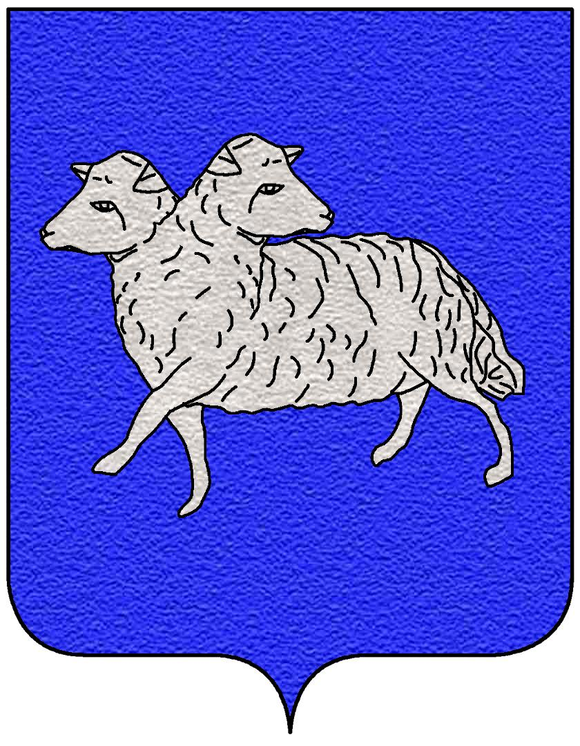 Stemma della famiglia Alessandri